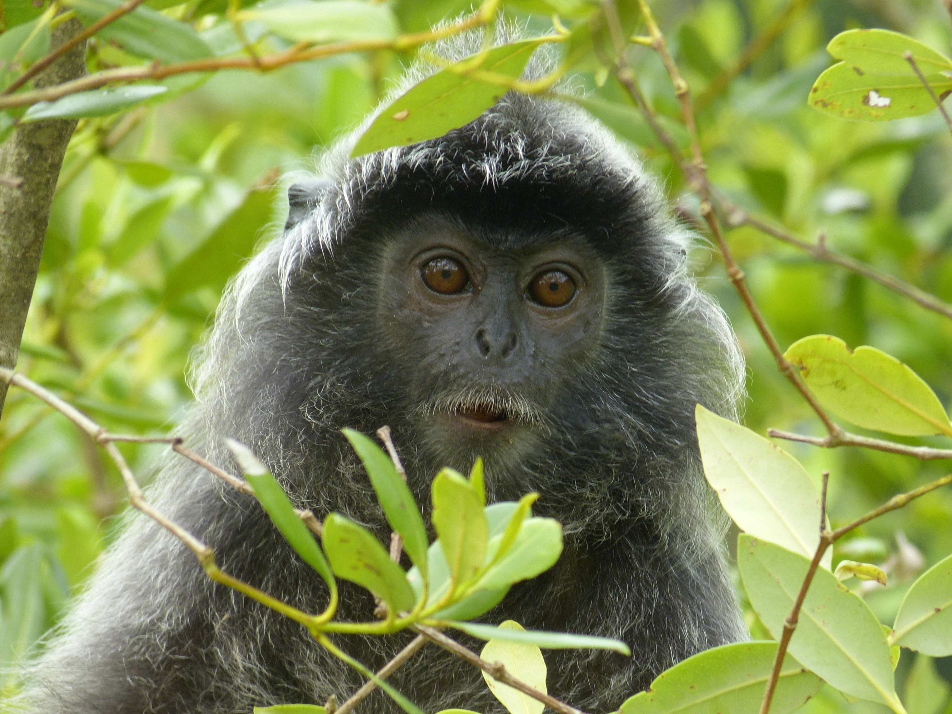 Bako NP, Sarawak, MALAYSIA